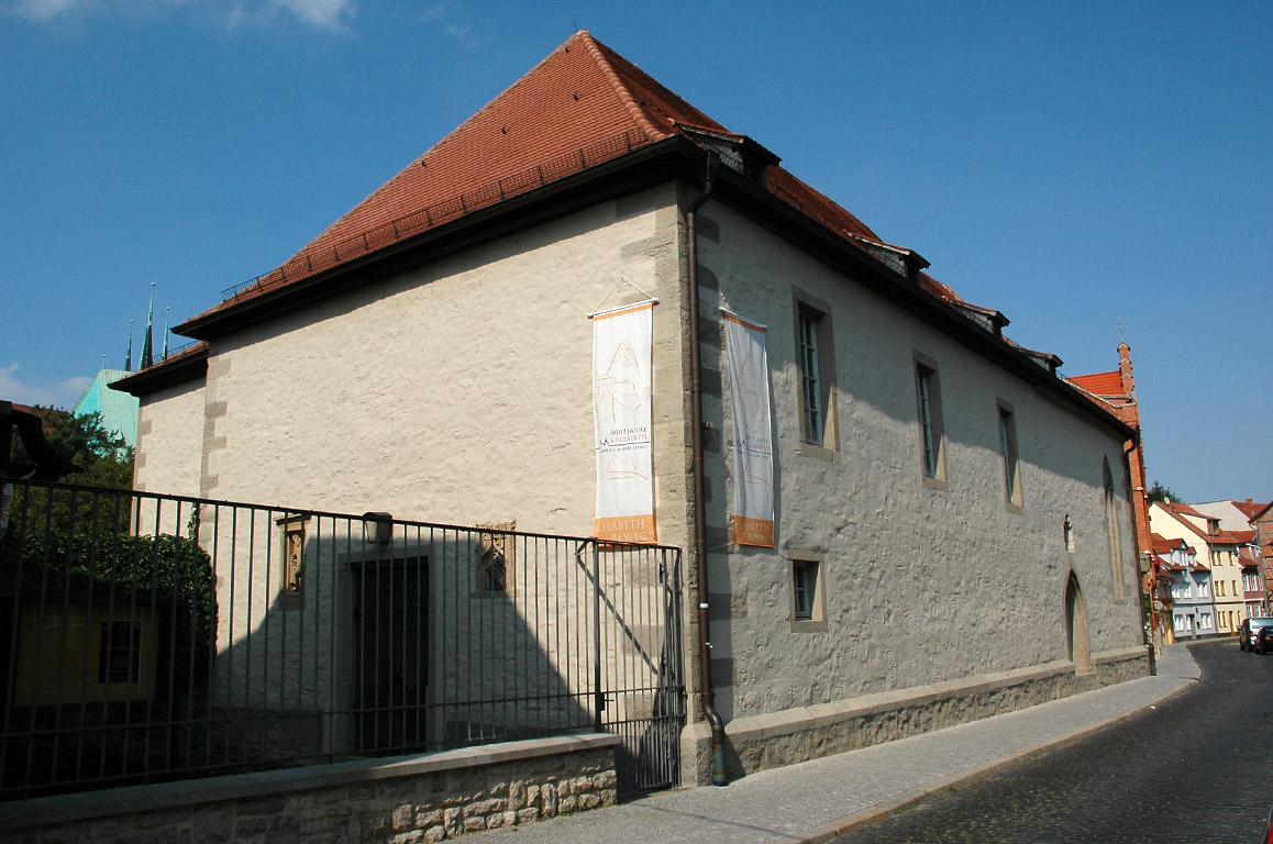 Brunnenkirche (errichtet 1253) am Fischersand in Erfurt